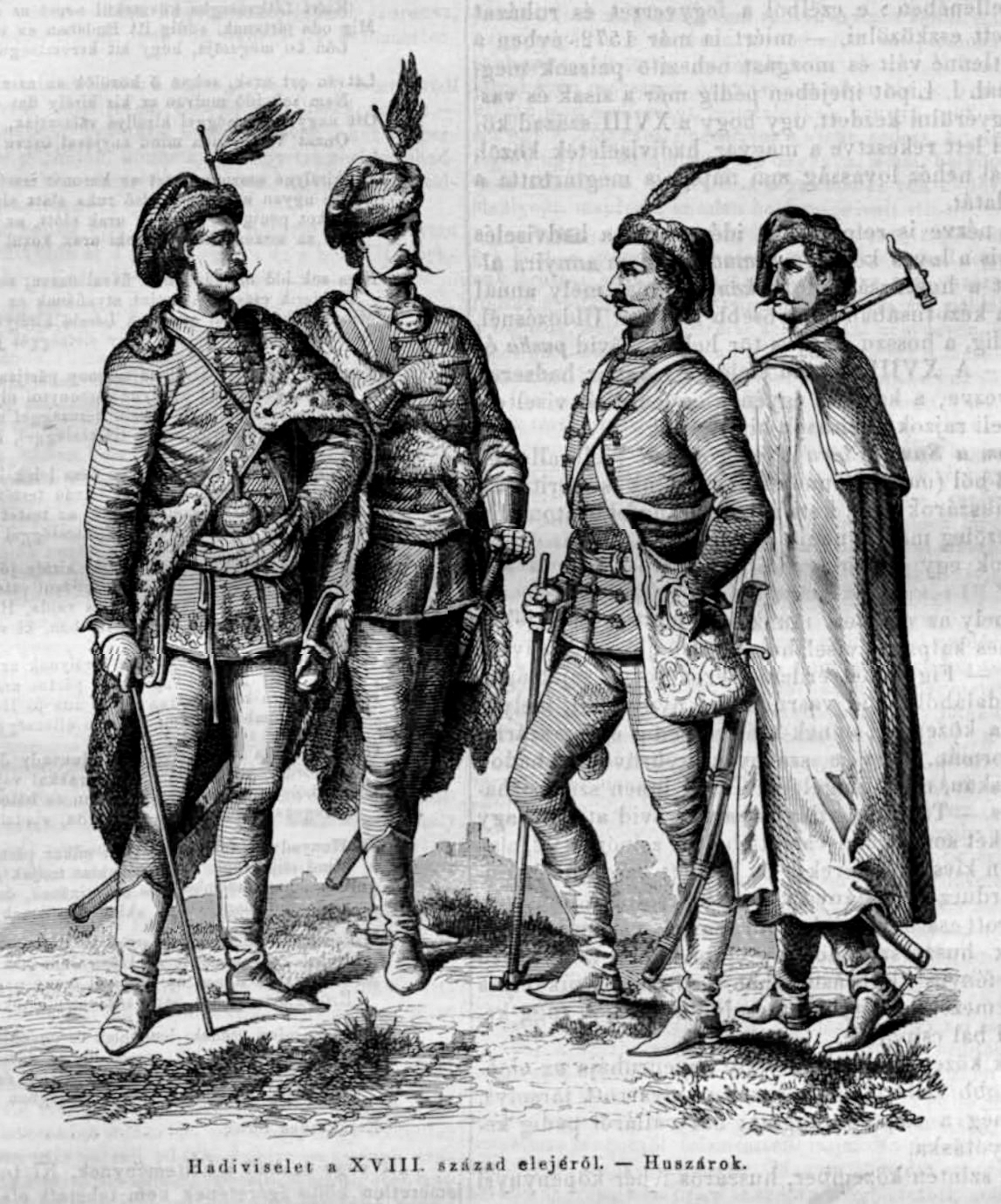 Hadi viselet a XIII. század elejéről - Huszárok